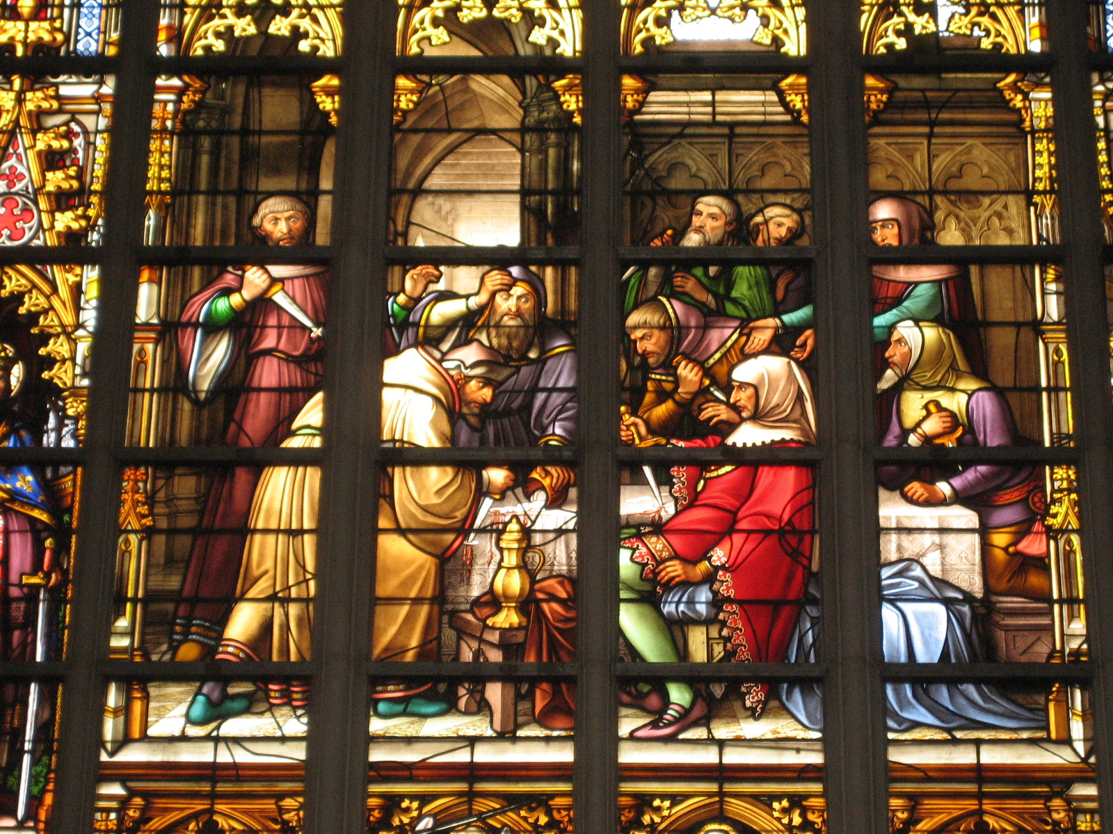 "Hostieprofanatioun" - Kierchefënster an der Kathedral St.Michel-Ste. Gudule zu Bréissel, ëm 1880.